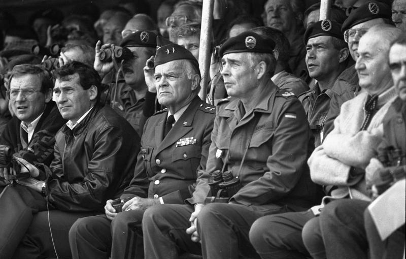 23.9.1986 Mitarbeiter des Bundespresseamtes beobachten das Herbstmanöver "Fränkischer Schild" der Bundeswehr - mit Beteiligung zahlreicher Soldaten aus NATO-Mitgliederstaaten sowie eines französischen Großverbandes - im Raum Würzburg.